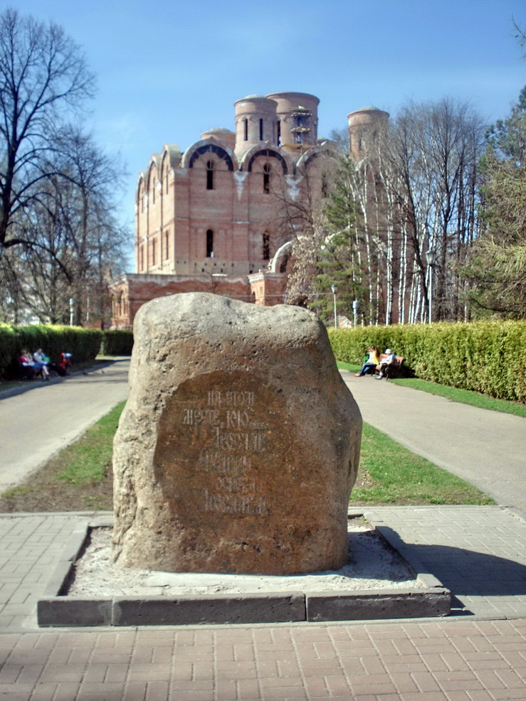 Легендарное место основания Ярославля (знак). За ним - строящийся Успенский собор.